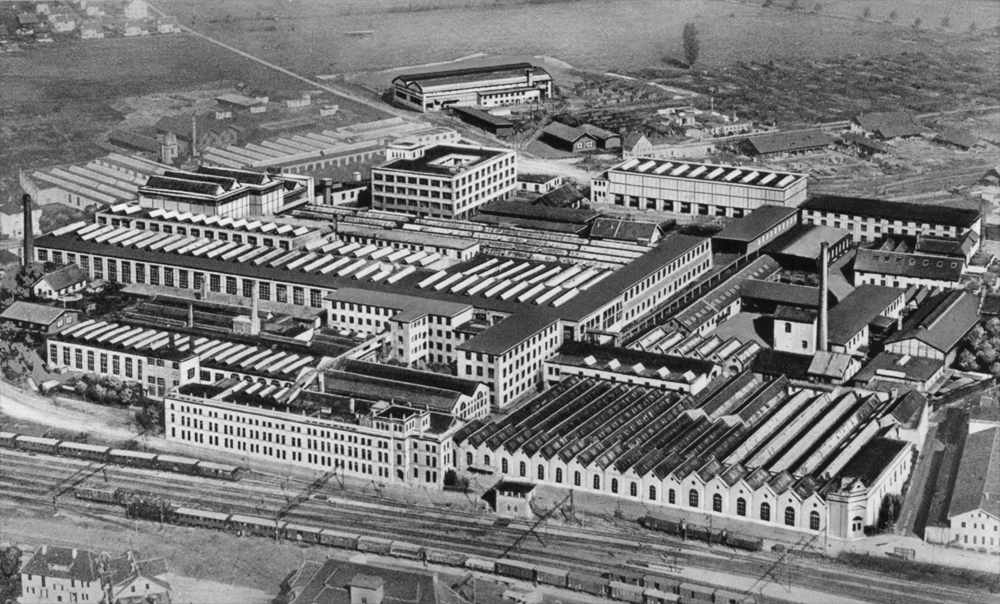 Die Maschinenfabrik Oerlikon (MFO) in Zürich, 1930